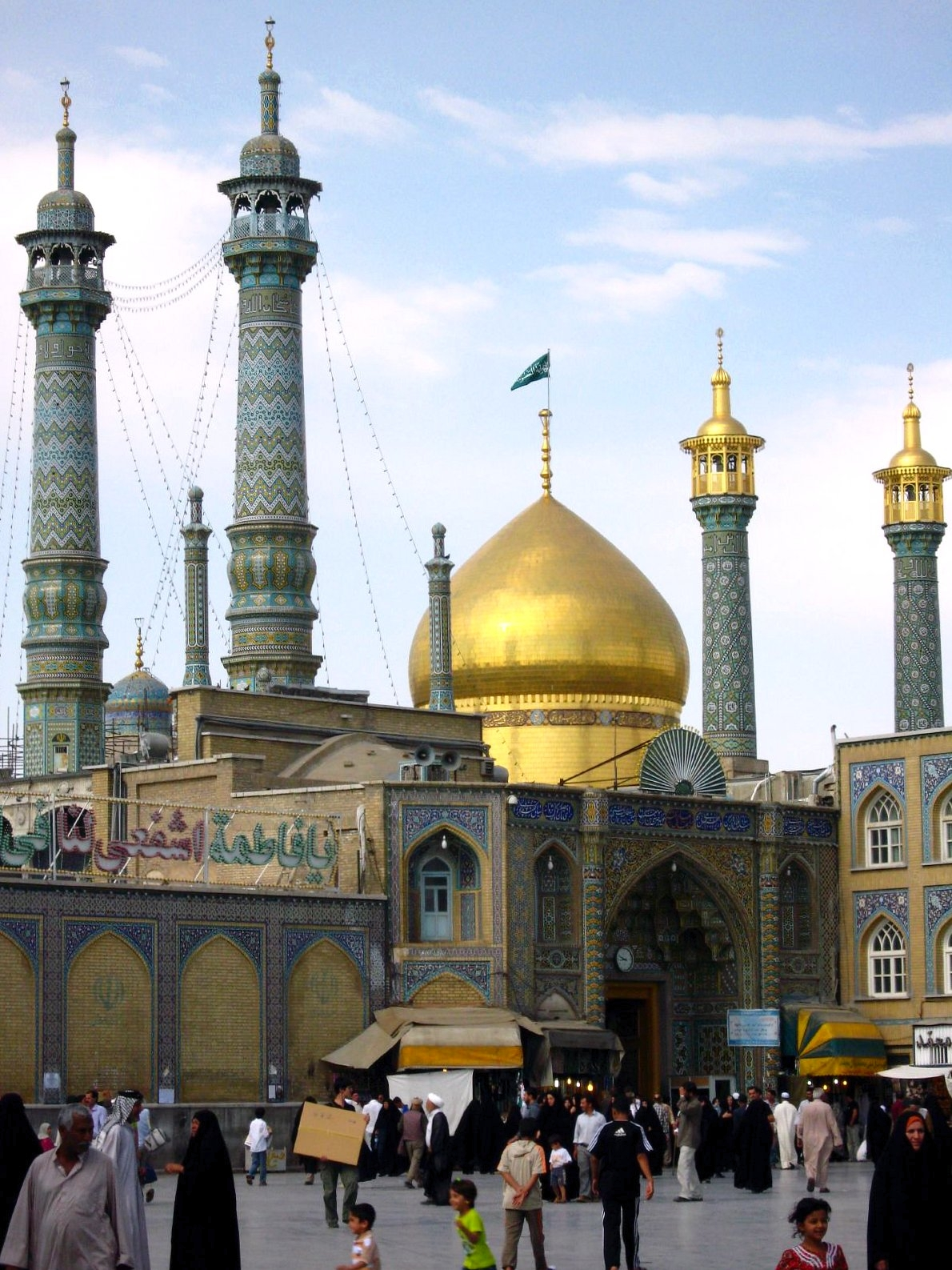 Hazrat-e Masumeh, Qom, Iran